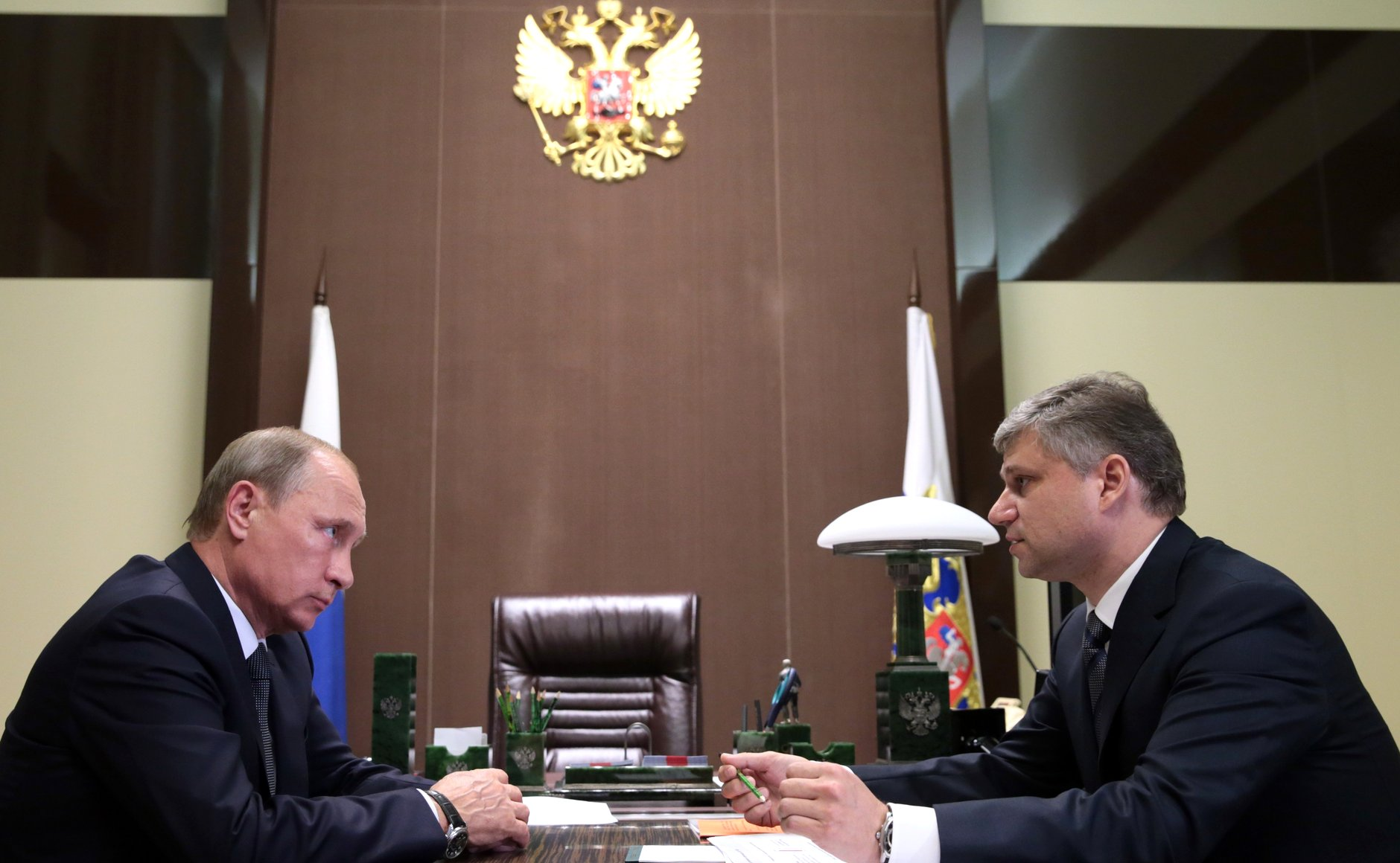 Встреча Владимира Путина с президентом ОАО «РЖД» Олегом Белозеровым